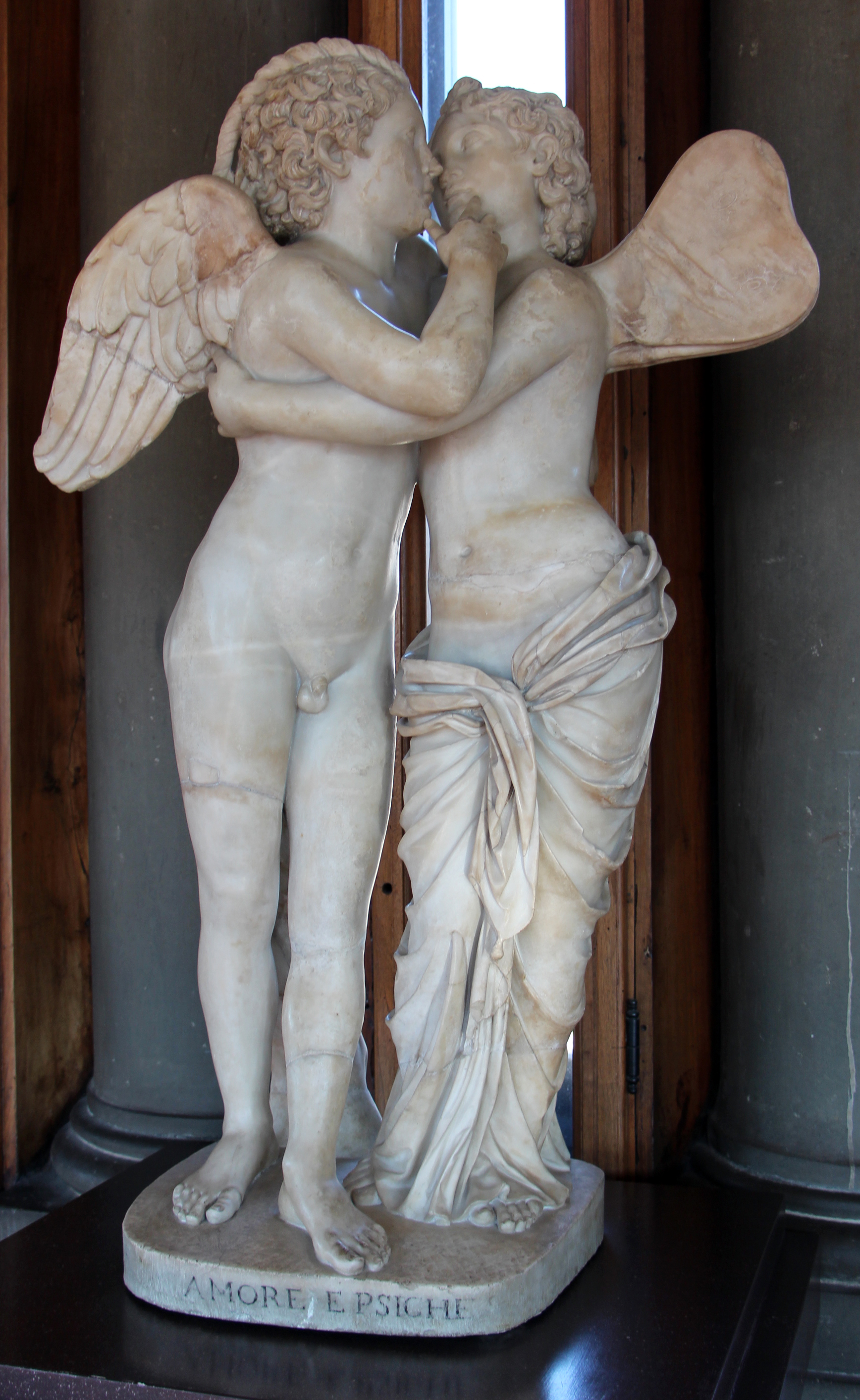 Amore e psiche, copia romana di un originale ellenistico della fine del IV sec. ac..JPG